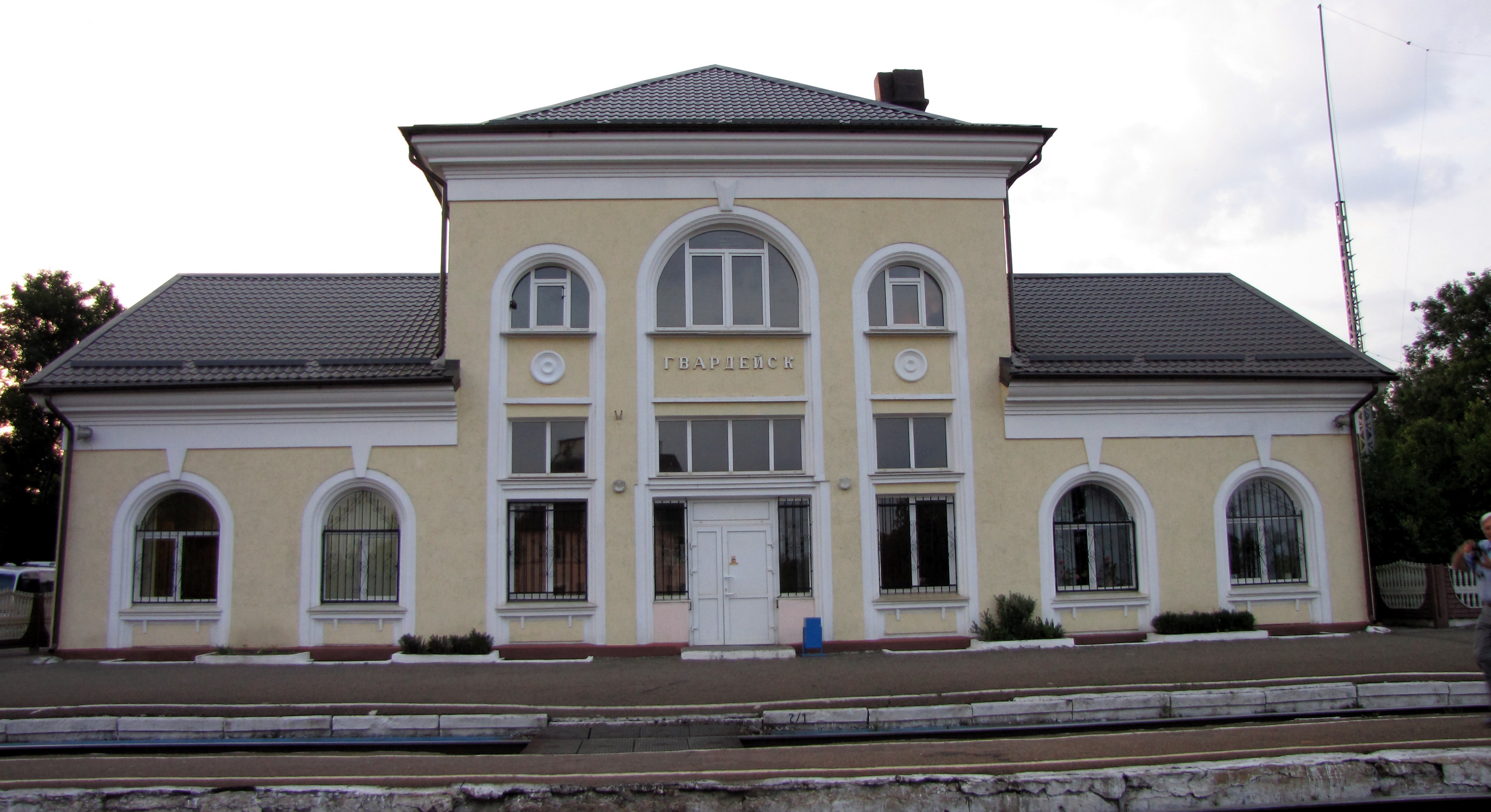 Bahnhofsgebäude Gwardeisk